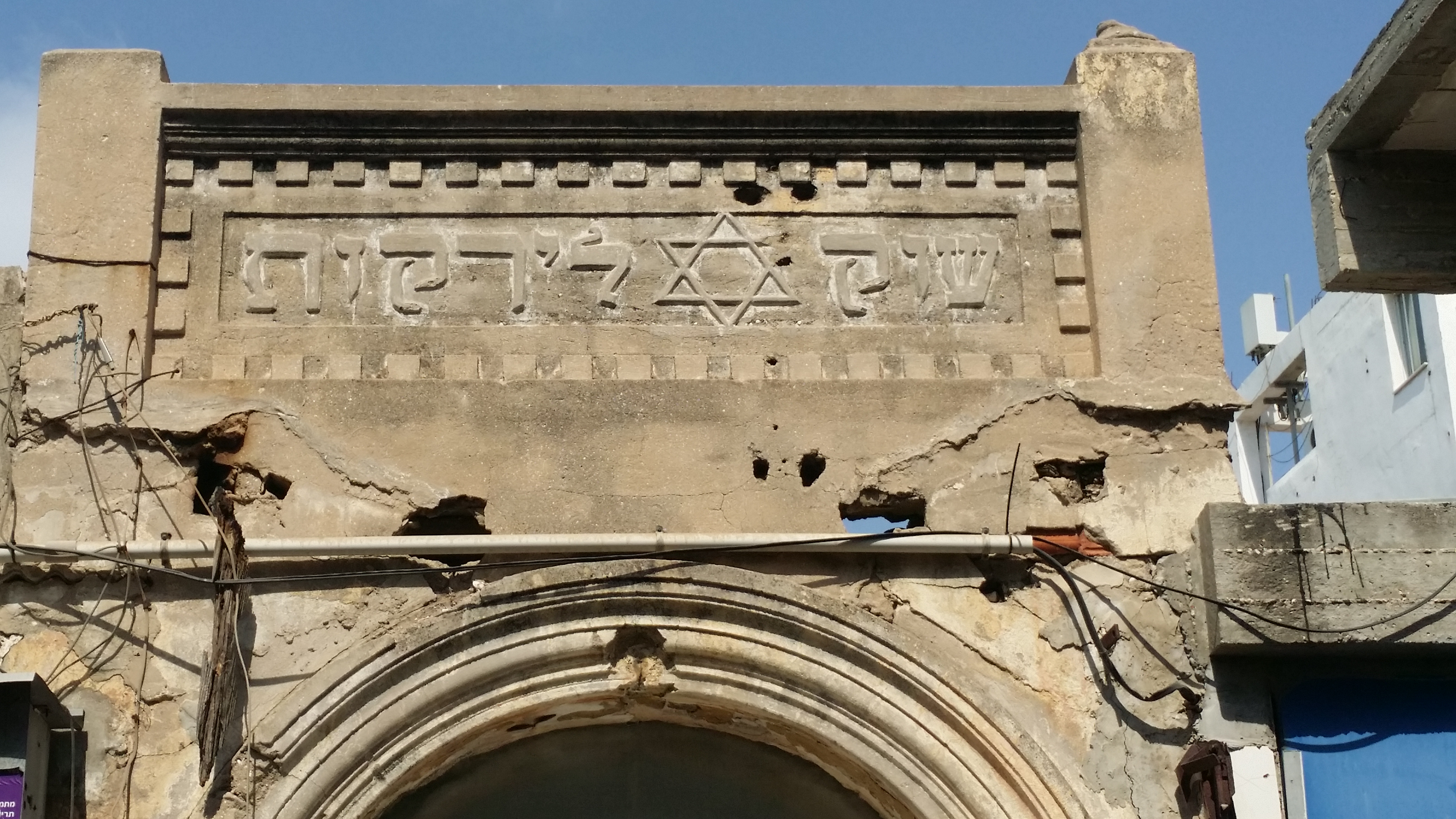 הכיתוב "שוק לירקות" בראש שער מקורי בשוק הכרמל ברחוב ישכון 41, תל אביב